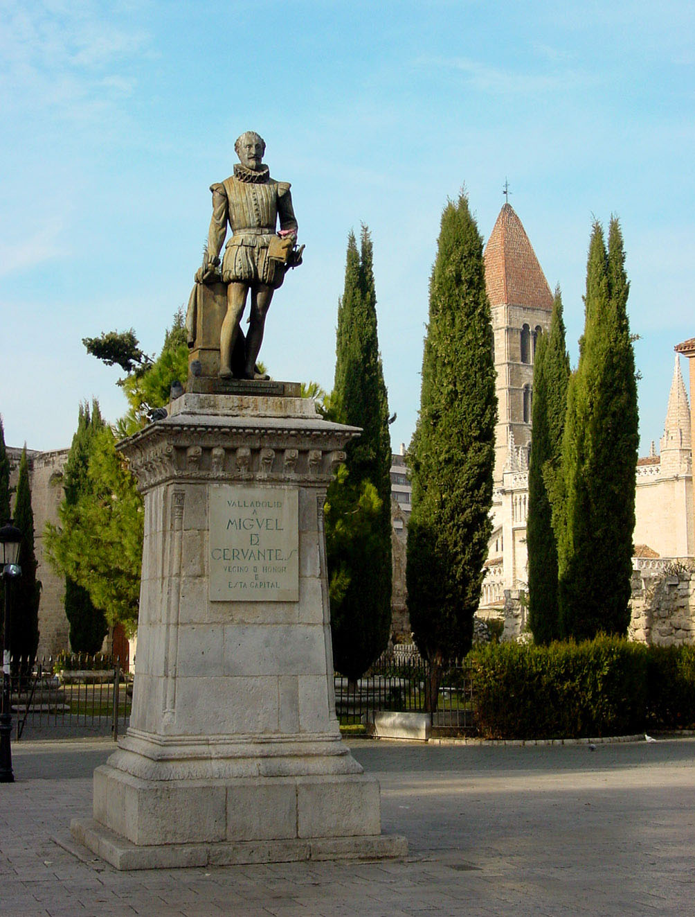 Estatua de Cervantes en Valladolid (España); modelada por don Nicolás Fernández de la Oliva, profesor de escultura de la Escuela de Bellas Artes de Valladolid. Está situada frente a la Universidad. Al fondo puede verse la torre románica de La Antigua.